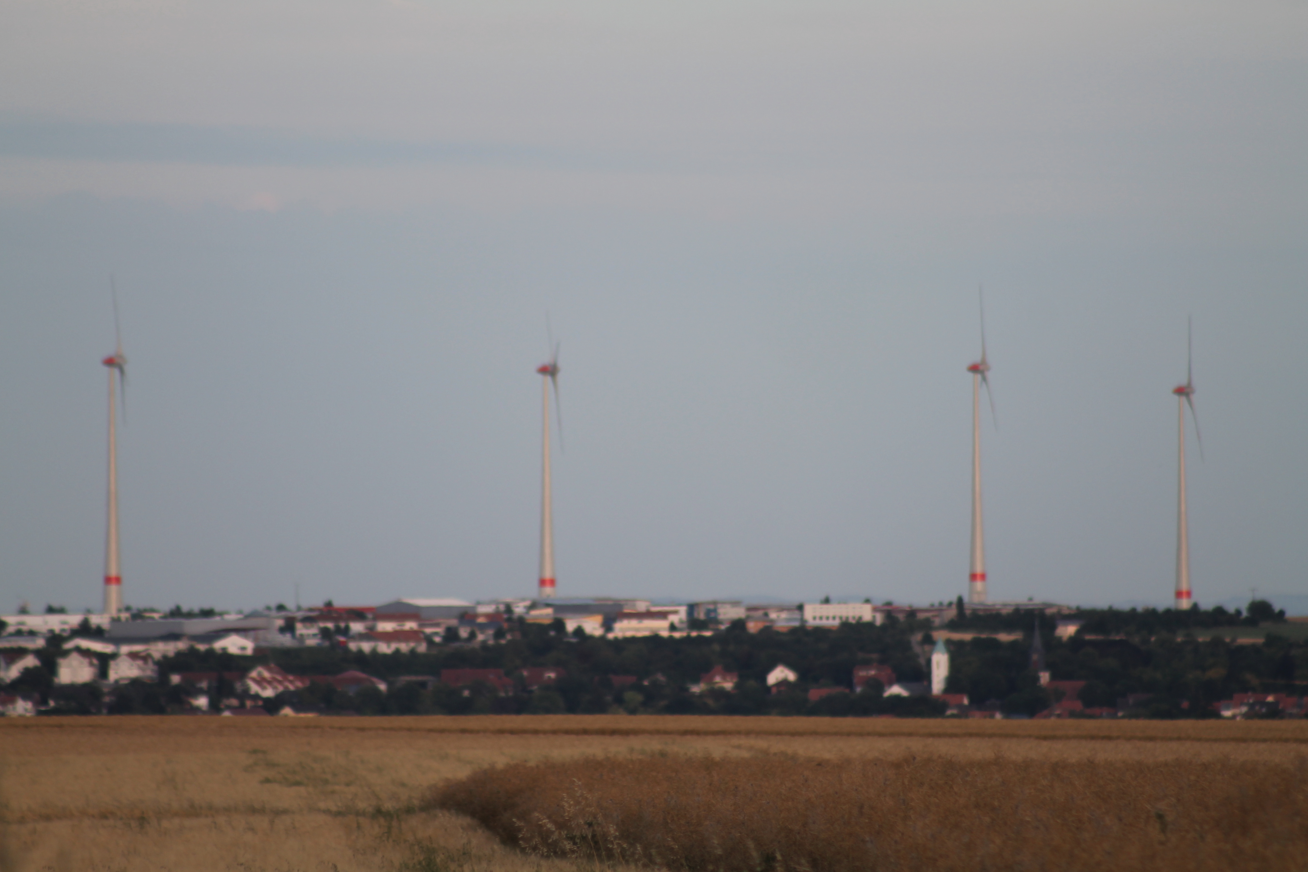 Windkraftanlagen bei Wörrstadt, fotografiert vom Rheinsenderplateau